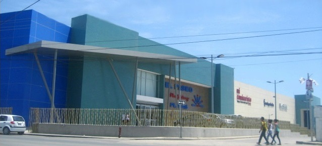 Centro comercial "El Paseo Shopping Playas", en la ciudad de General Villamil "Playas"